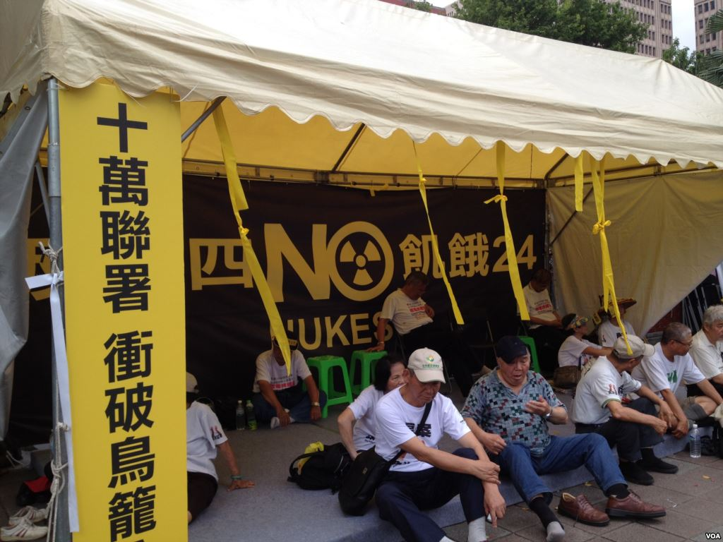 公投護台灣聯盟群眾穿著「扁案 政治迫害」白色T恤，參加「反核四 飢餓24」接力靜坐禁食活動。